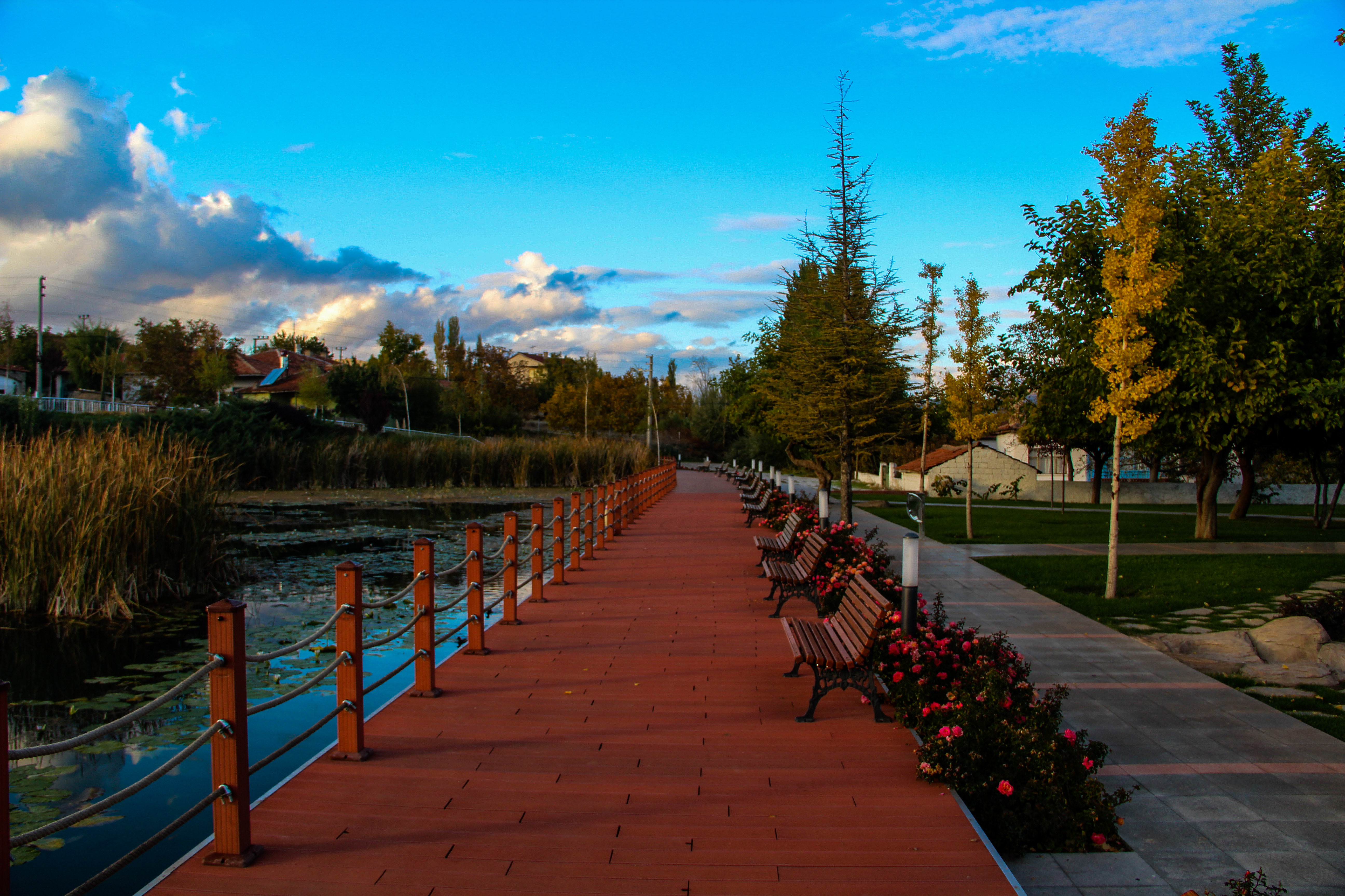 Autumn on Lake Hilla